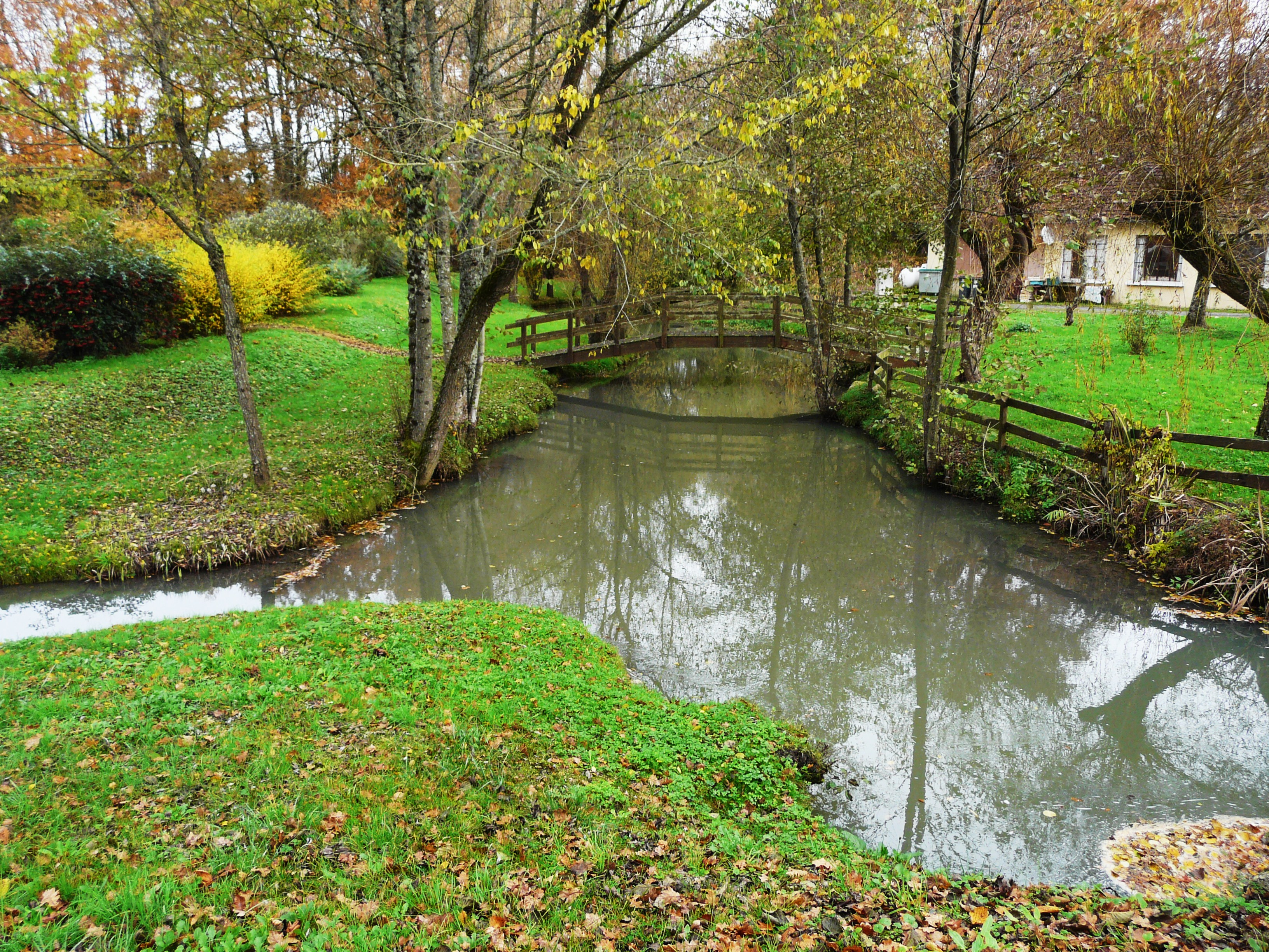 Le ruisseau de Varaignes au pont de la départementale 75, Varaignes, Dordogne, France